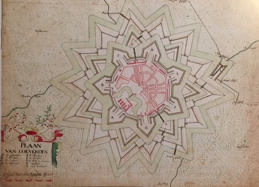 Coevorden met vestingswerken volgens het Nieuw-Nederlandse stelsel